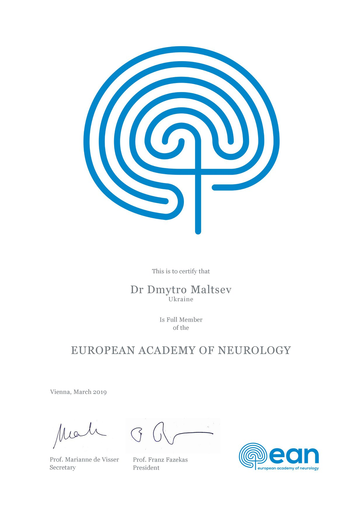 Сертифікат Європейської академії неврології, виданий Дмитру Мальцеву, дійсному члену EAN у березня 2019 року